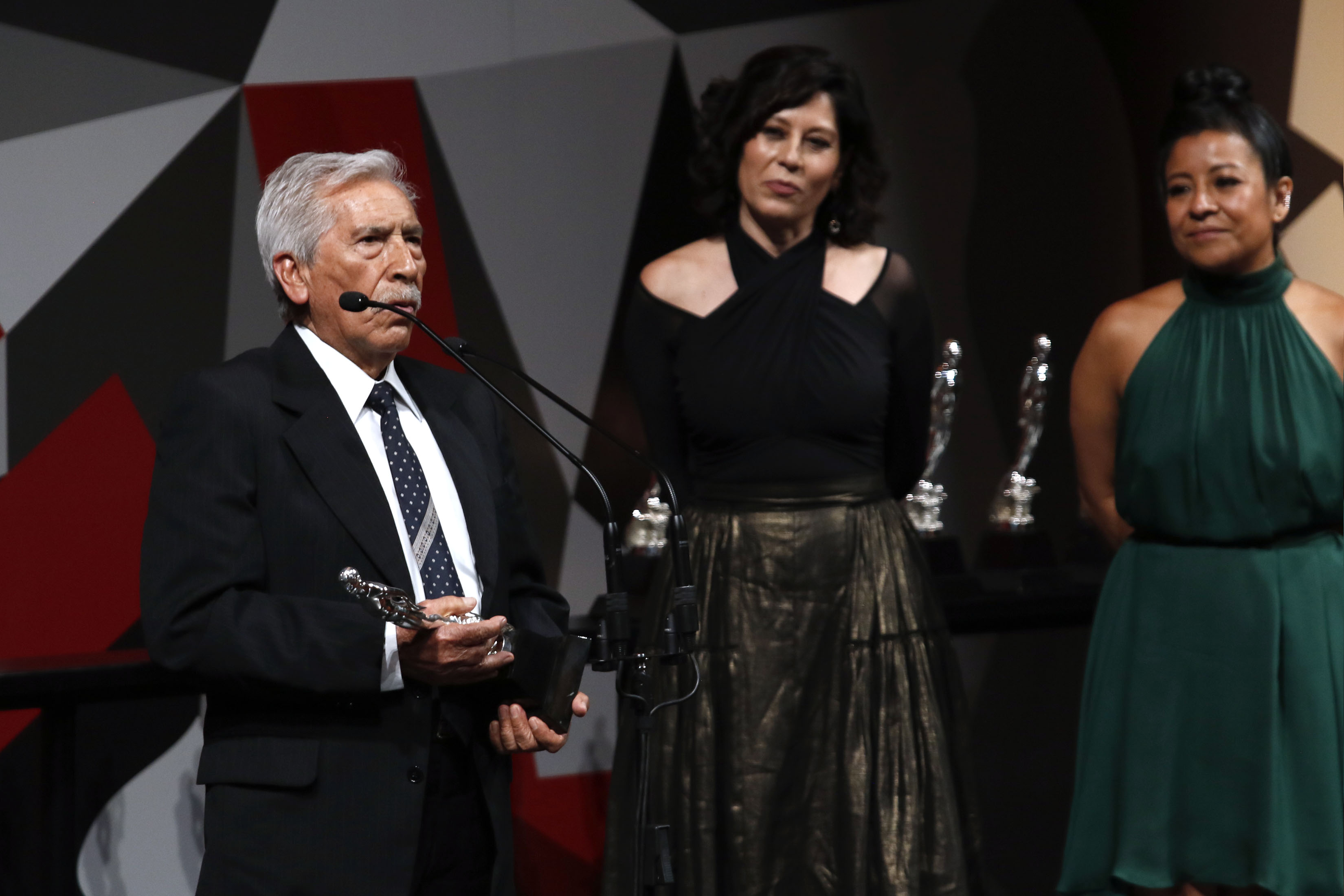 Martes 11 de julio de 2017. En el Palacio de Bellas Artes, se realizó la ceremonia número 59 de la entrega de Premios de la Academia Mexicana de Cinematografía, Ariel. Encabezado por su presienta la actriz Dolores Heredia. MEJOR ACTOR Empate, José Carlos Ruiz por Almacenados. Fotografía: Milton Martínez / Secretaría de Cultura CDMX.